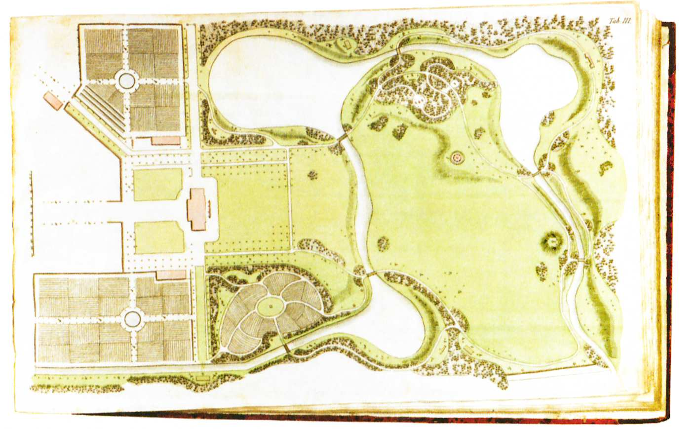 Gartenplan aus Johan Ludvig Mansa Plane zu Garten-Anlagen im englischen Geschmack, nebst Anweisung wie man kleinere Partien einteilen und bepflanzen kann dänisch. Kopenhagen 1798 und deutsche und englische Ausgabe